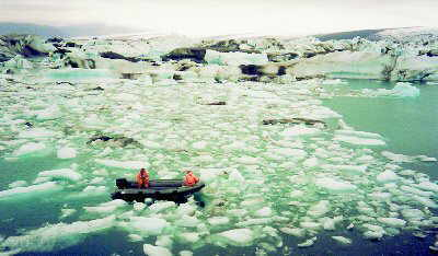 lac de de Jökulsarlon.